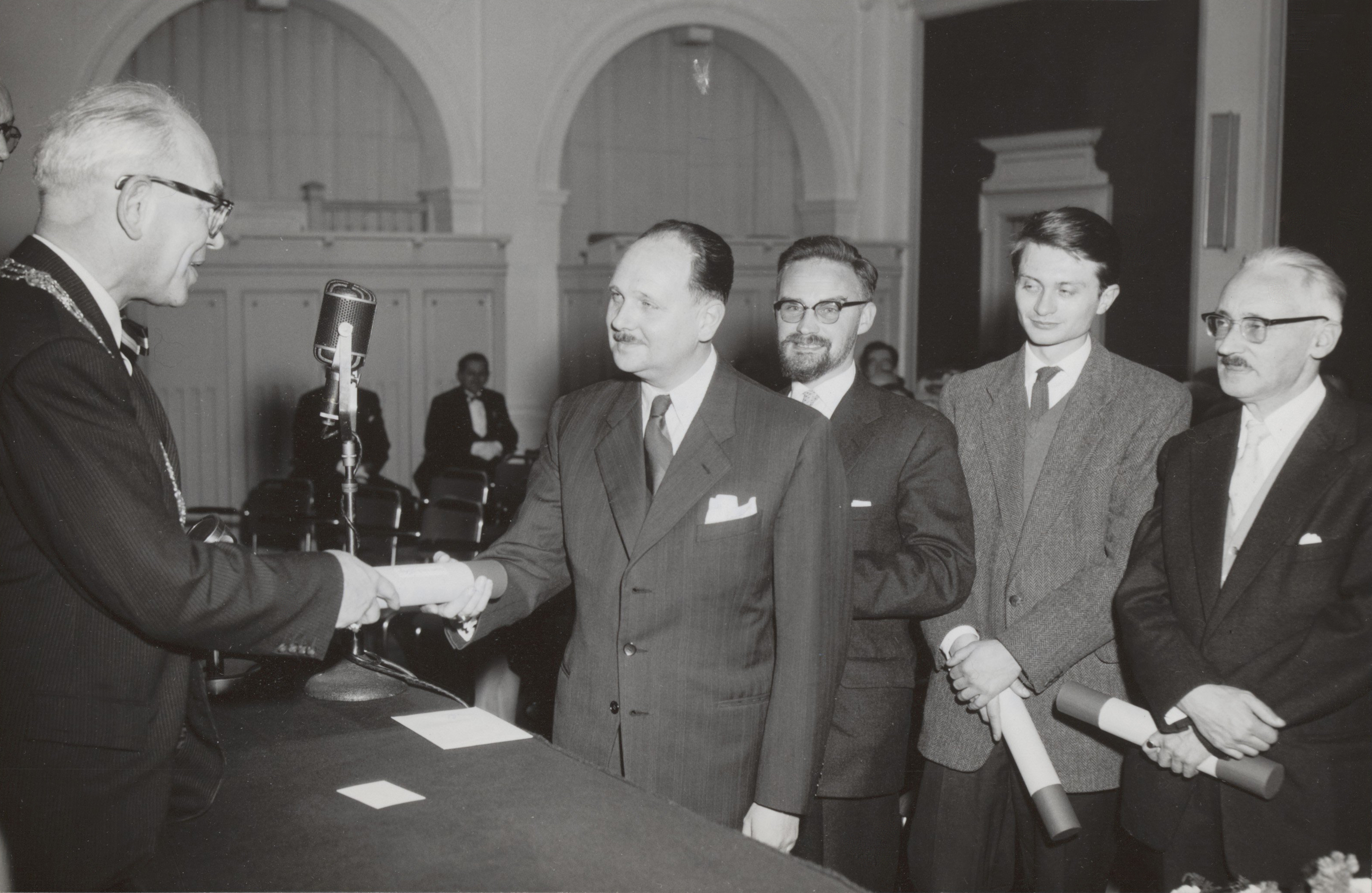 Uitreiking Jan Campertprijzen, 30 nov. 1956. V.l.n.r. locoburgemeester van Den Haag J. van Zwijndrecht; Albert van der Hoogte; Vic Reinders (die voor Pierre Kemp de Constantijn Huygens-prijs in ontvangst nam); Remco Campert; W. Jos de Gruyter (directeur Gronings Museum).